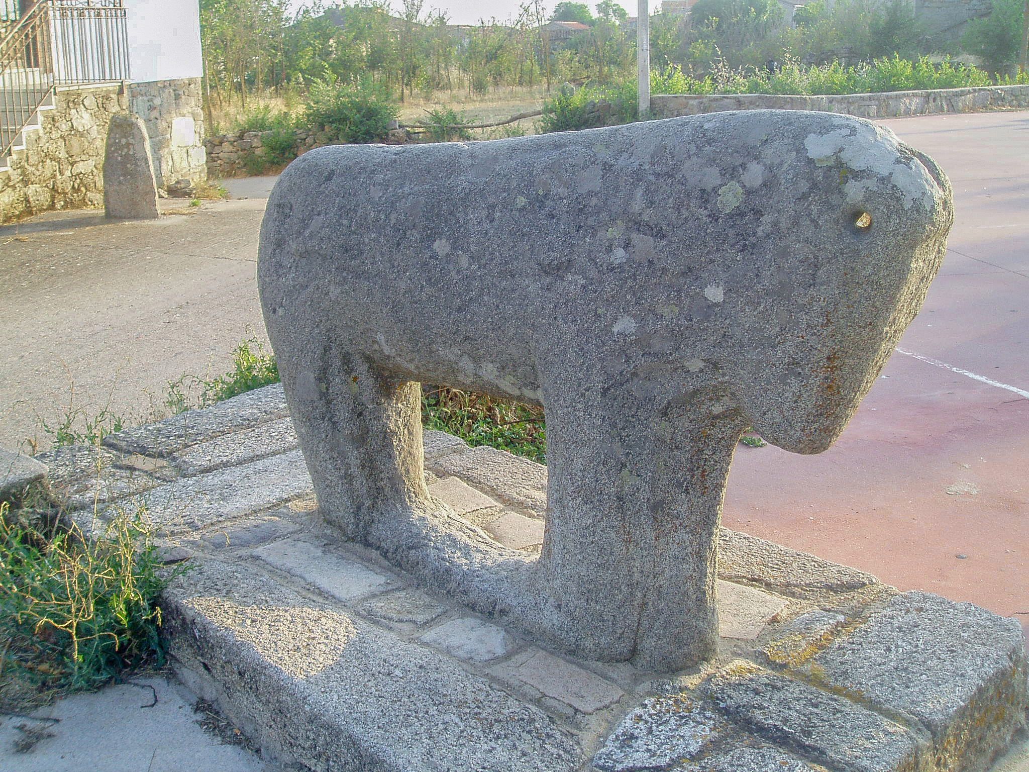 Mula prerromana situada en Villardiegua, Zamora, España.